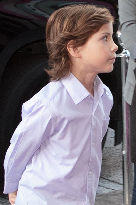 Toronto International Film Festival 2015